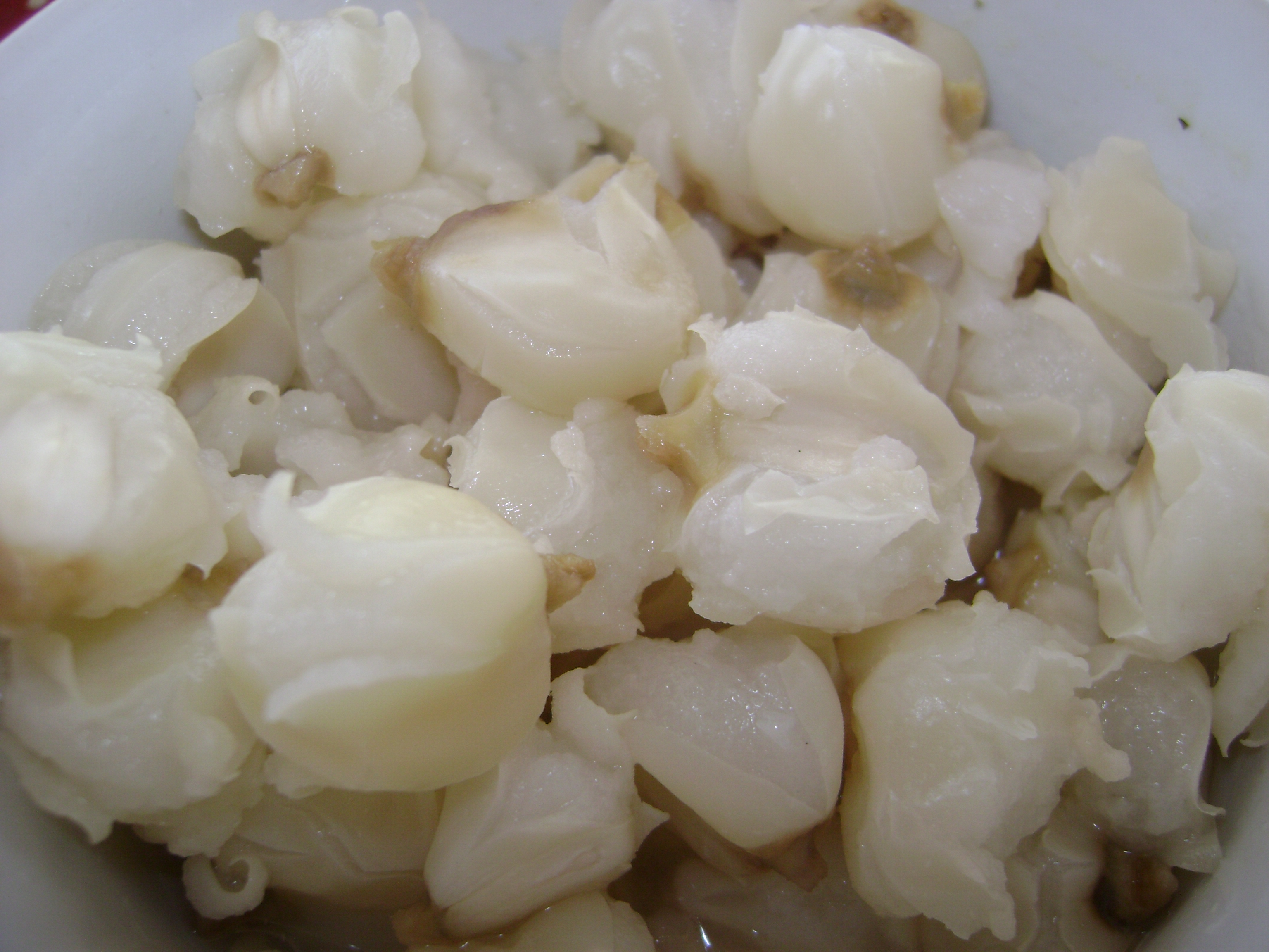 Mote hervido. Lima, Perú.